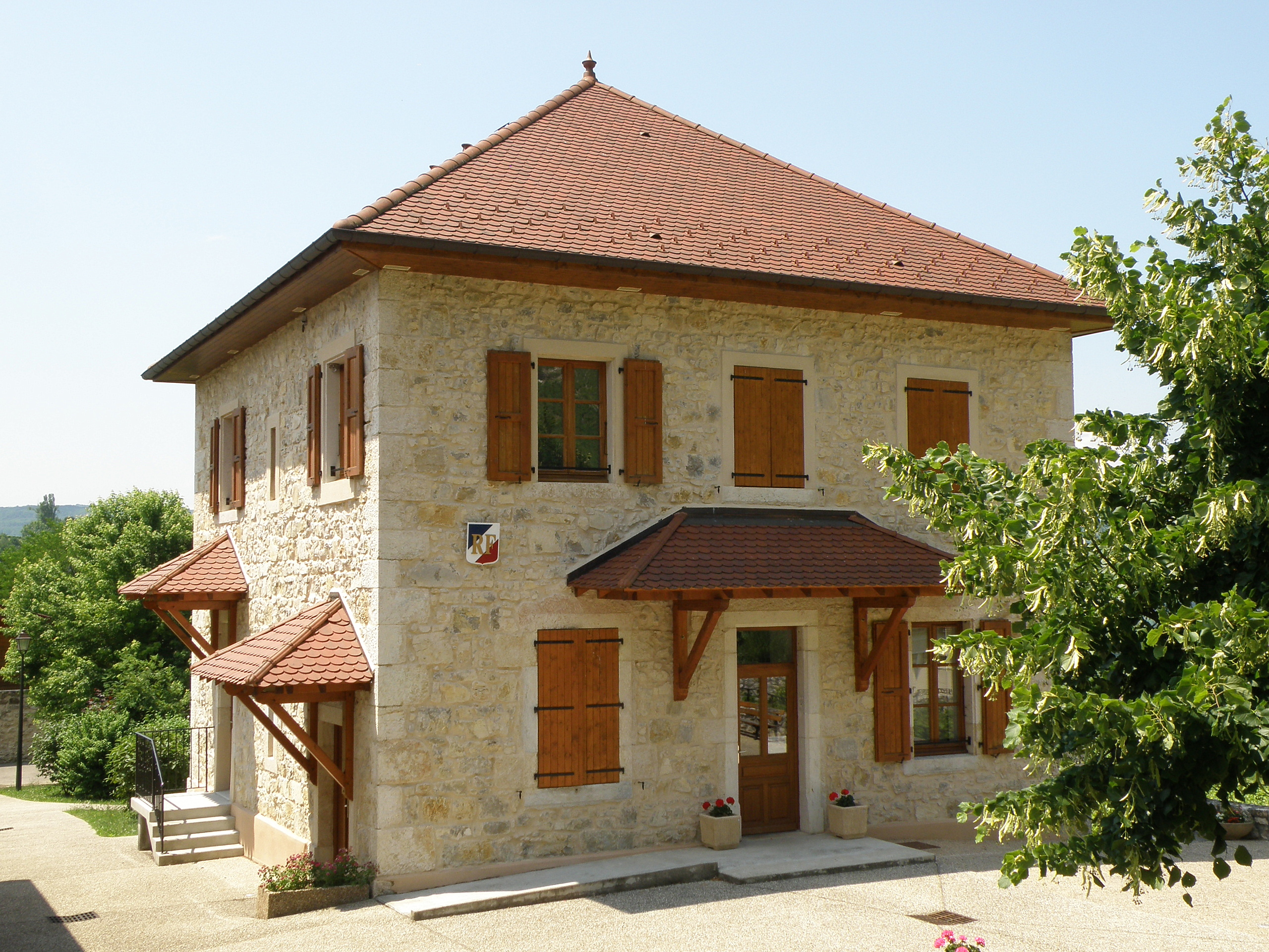 Jongieux, comm. du départ. de la Savoie (région Rhône-Alpes, France). Mairie.